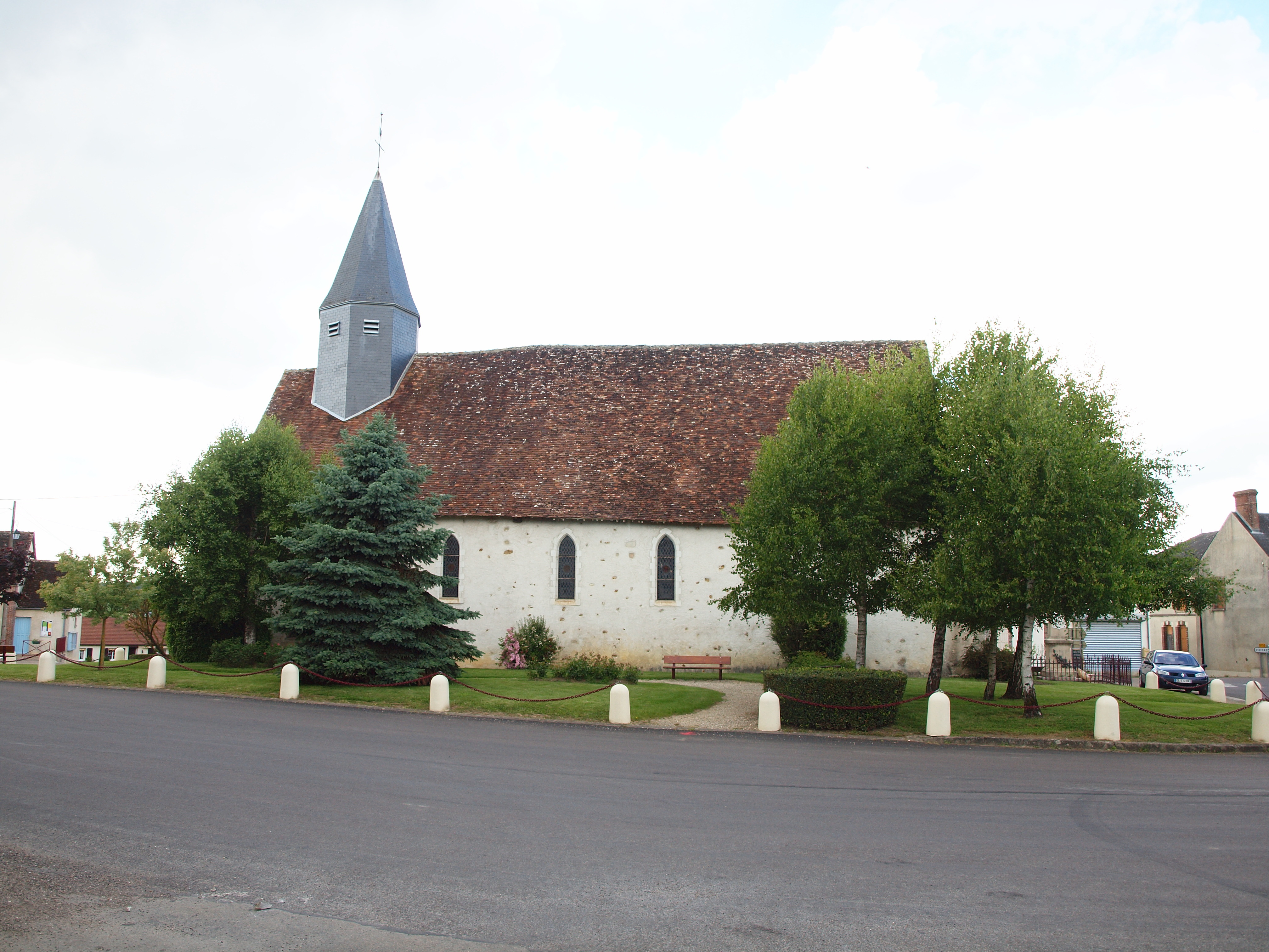 Saint-Martin-d'Ordon (Yonne, France)